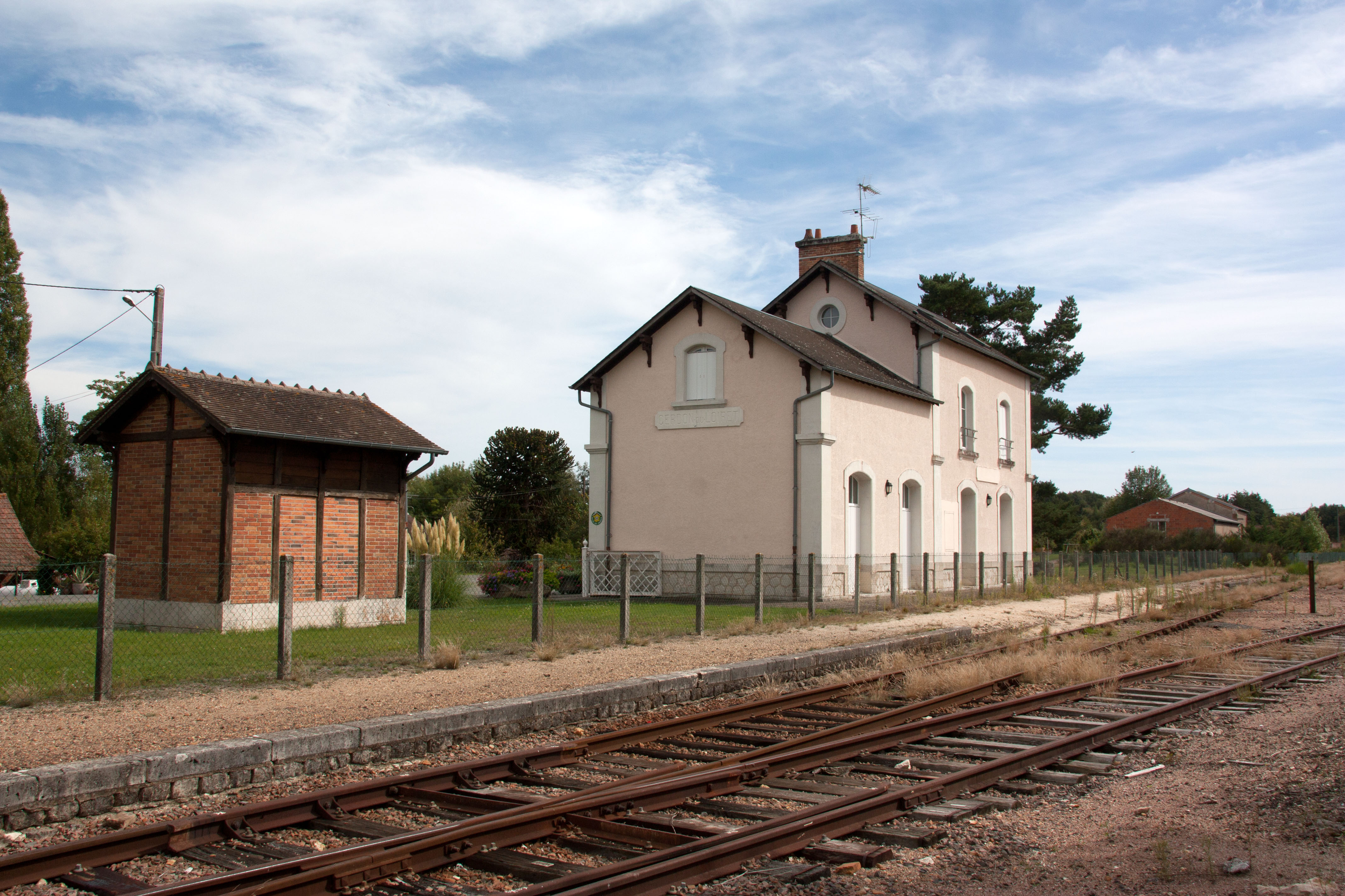 Gare de Cerdon-du-Loiret, Cerdon-du-Loiret, Loiret, France.